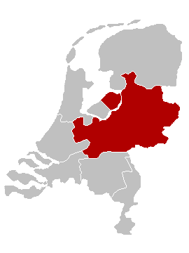 Gebied van het bisdom Utrecht